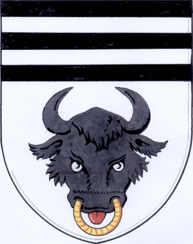 znak, Velké Tresné, okres Žďár nad Sázavou